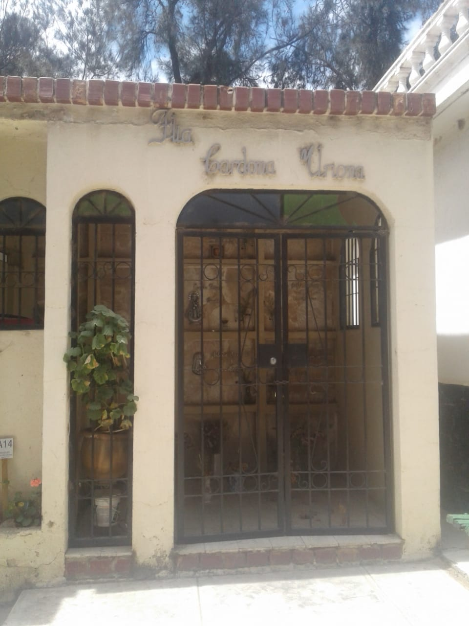 fachada del mausoleo cardona uriona en el cementerio general de cochabamba